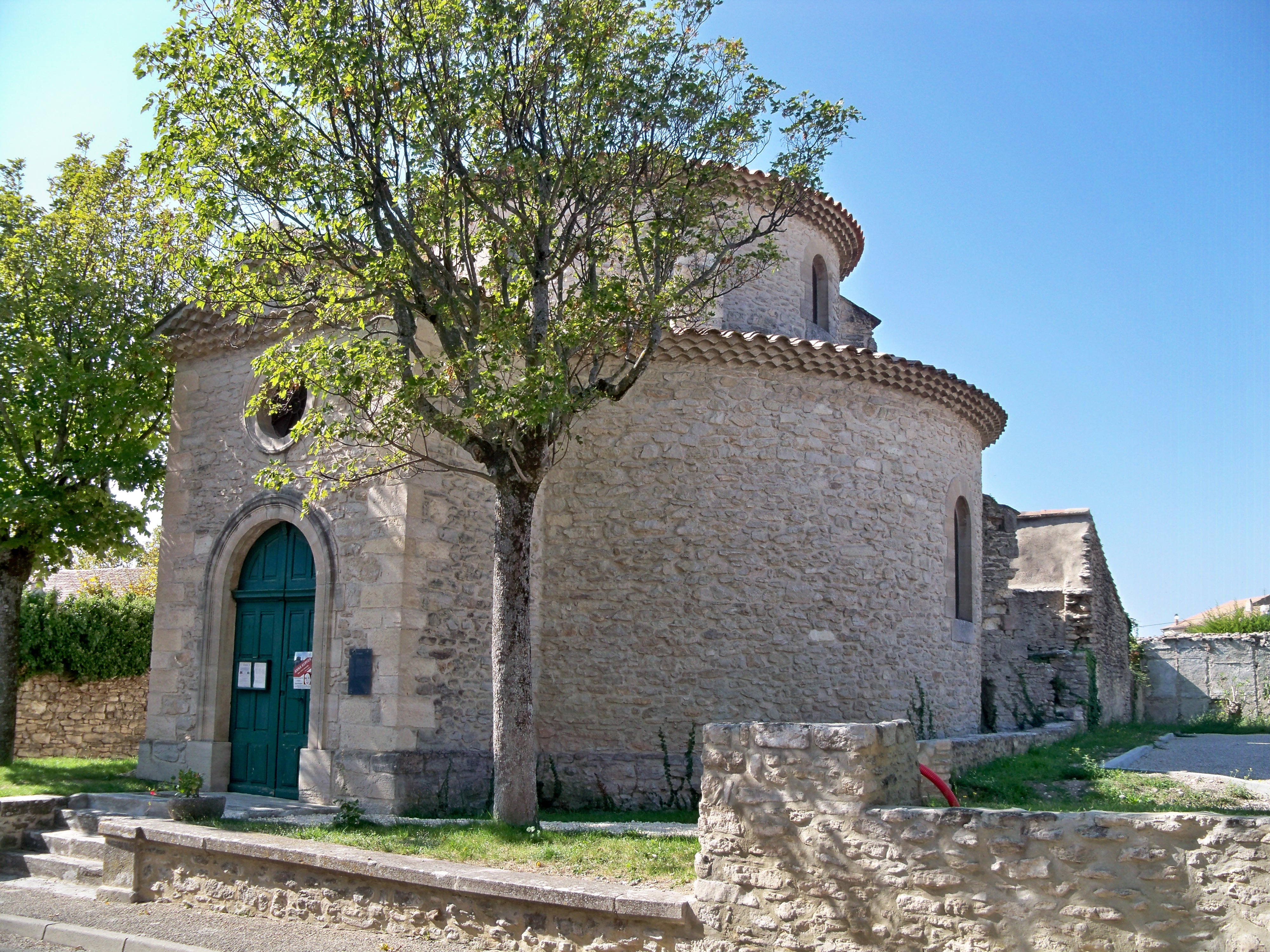 Temple protestant de Taulignan, Côtes-du-Rhône (rue des) (Inscription, 2010) .